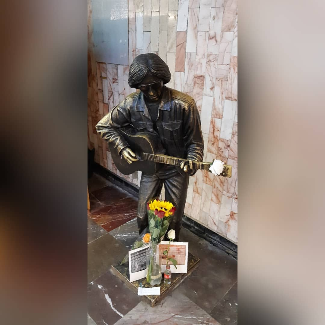 Estatua del cantautor Rockdrigo González